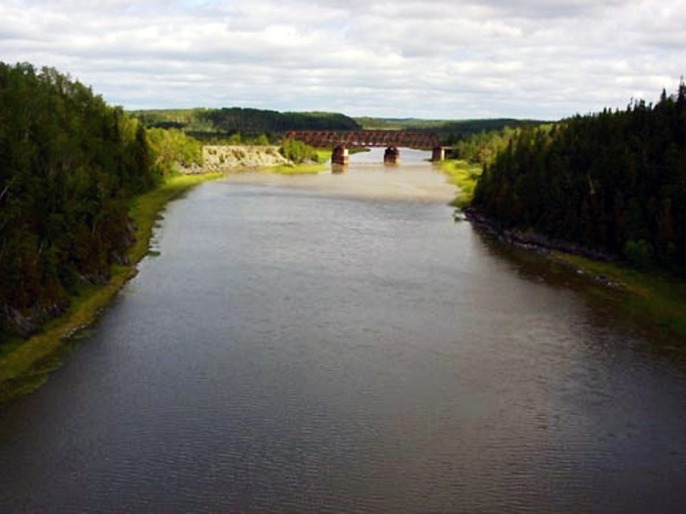 Vue sur la rivière Kinojévis à partir du pont de Rouyn-Noranda. View on the Kinojevis river from a bridge in Rouyn-Noranda.